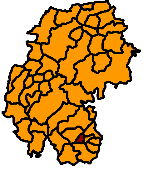 Gillersdorf hervorgehoben, Ilm-Kreis